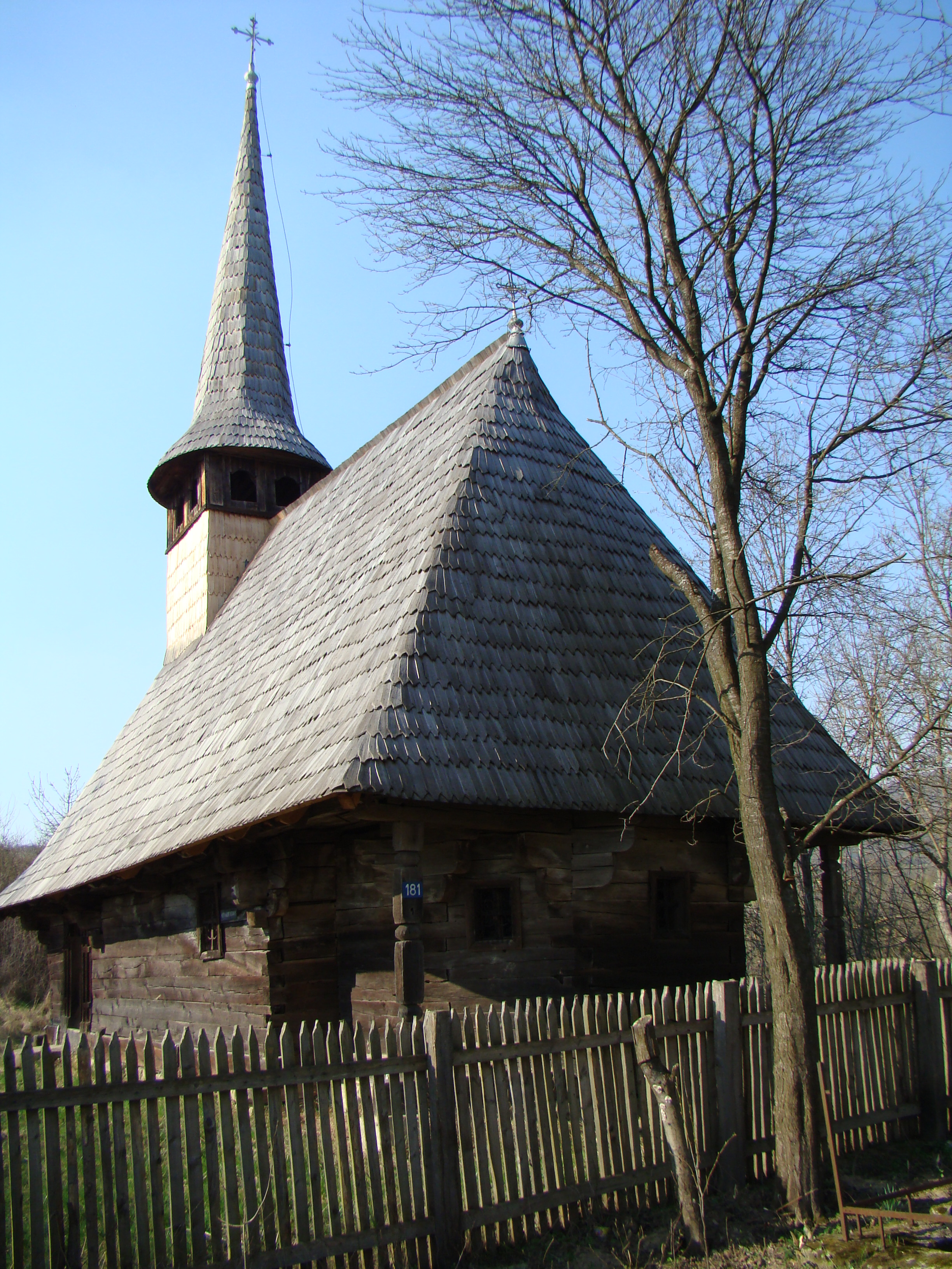 Biserica de lemn "Sf. Nicolae" din Sălișca, județul Cluj